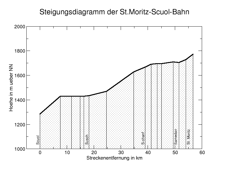 Steigungsdiagramm der St.Moritz-Scuol-Bahn der Rhätische Bahn